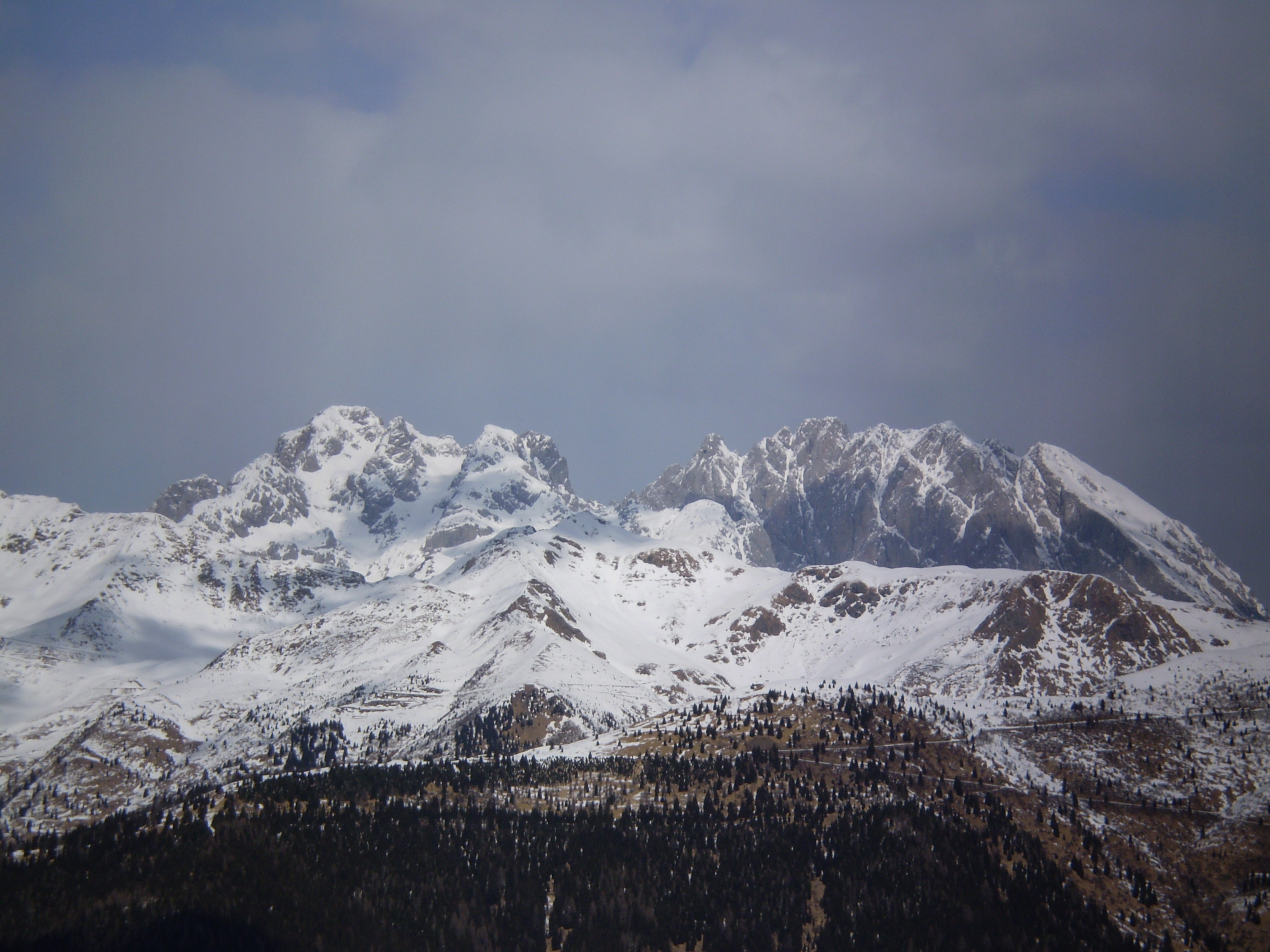 Coglians e Creta delle Cjanevate visti dallo Zoncolan (Carnia)